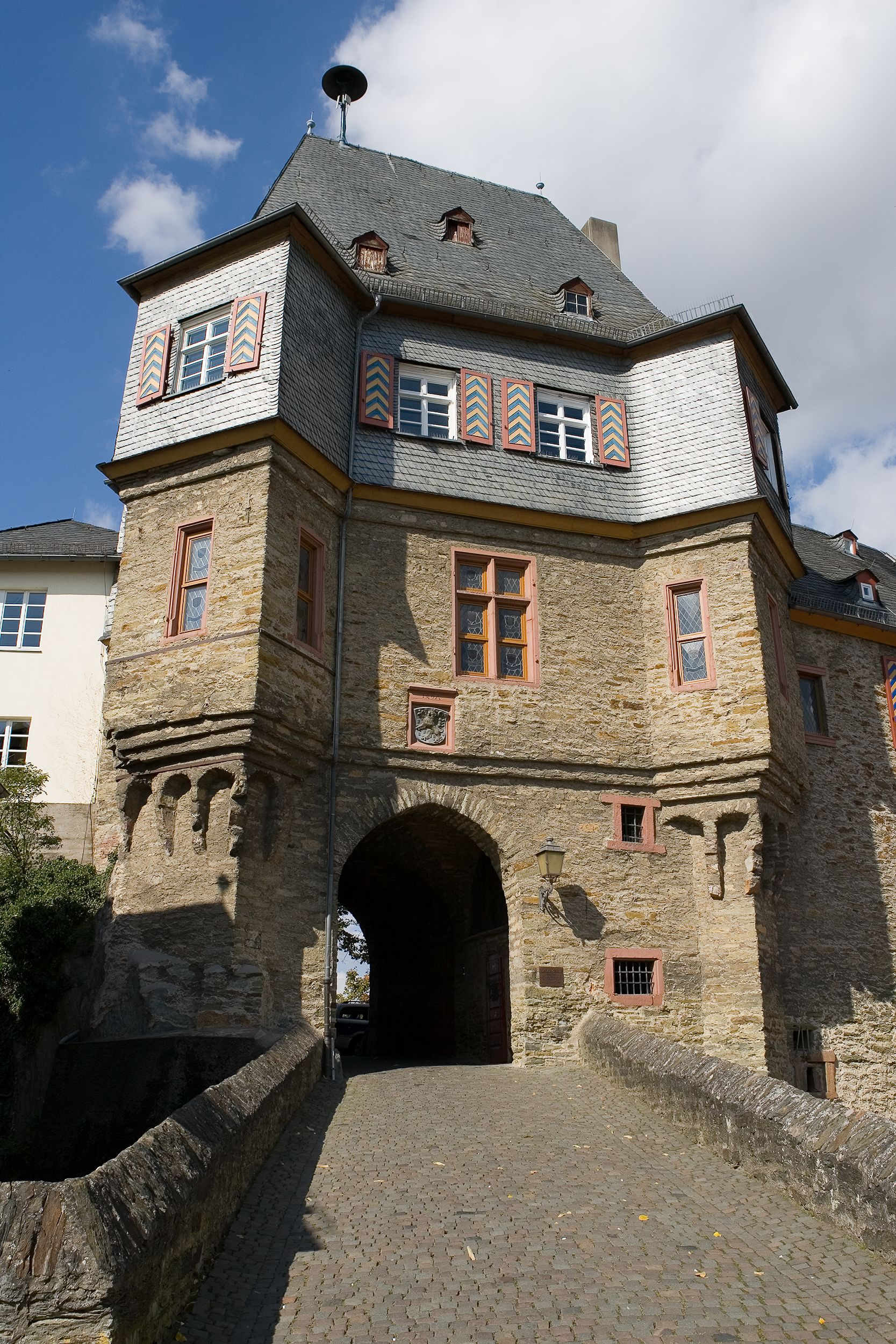 Zum König-Adolf-Platz gewandte Vorderseite des Torbogengebäudes in Idstein. Selber fotografiert im September 2007, Doppellizensierung GFDL & CC-BY-SA 2.5.